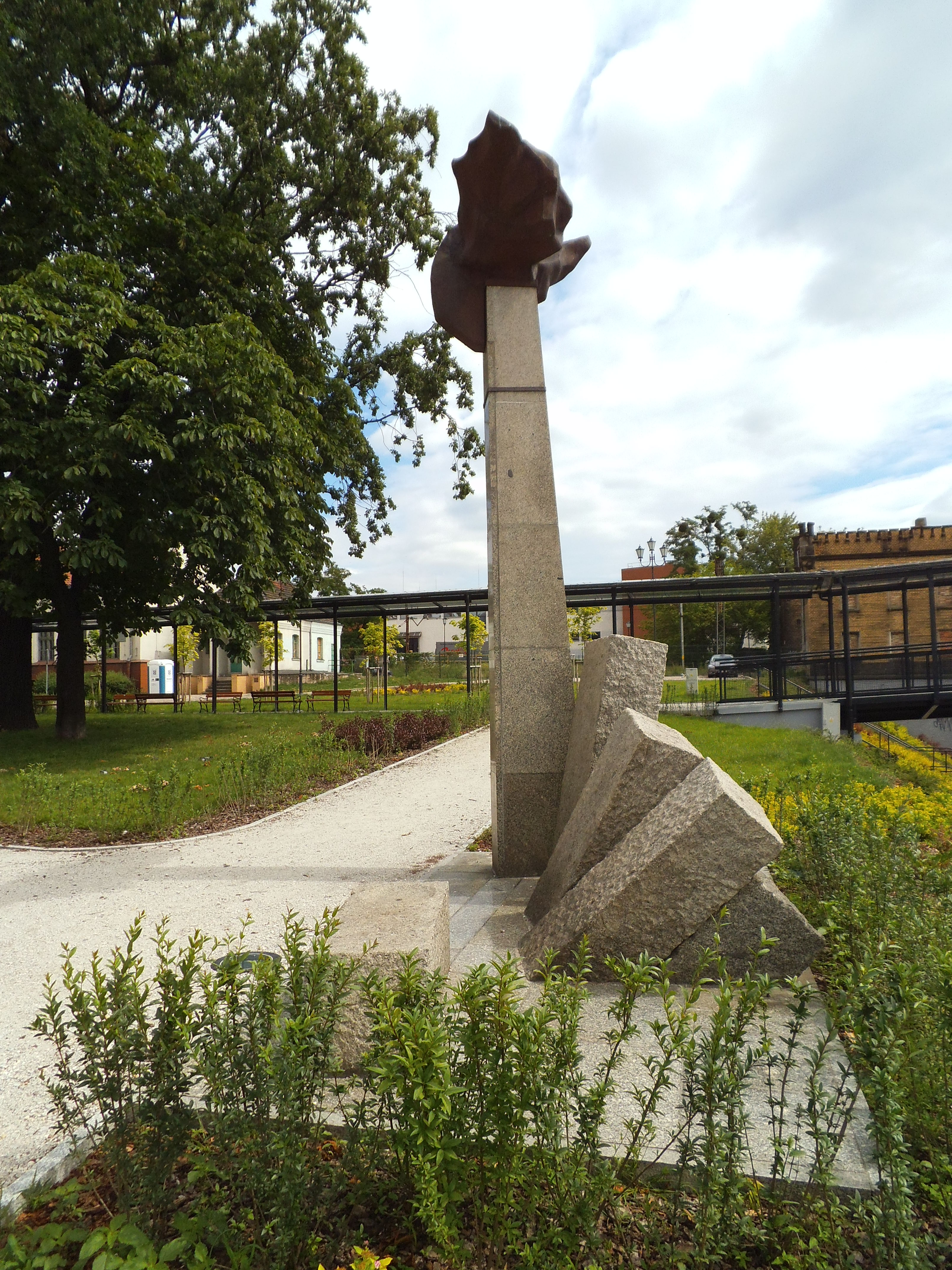 Toruń Miasto23